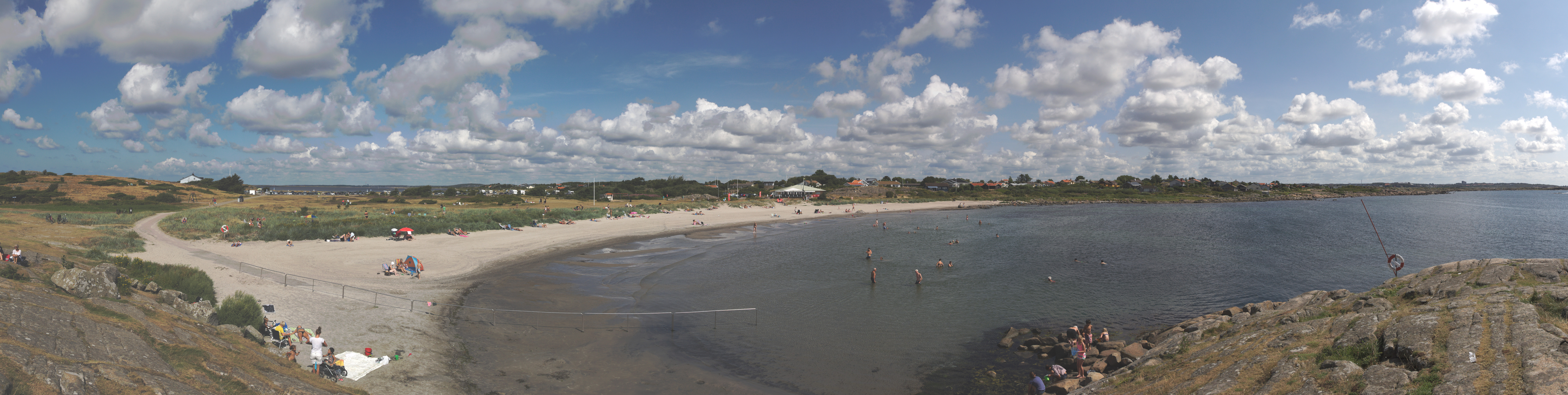 Panorama från 13 bilder över 5:e vik på Getterön. Vyn är från den lilla höjden just väster om viken mot nordost.